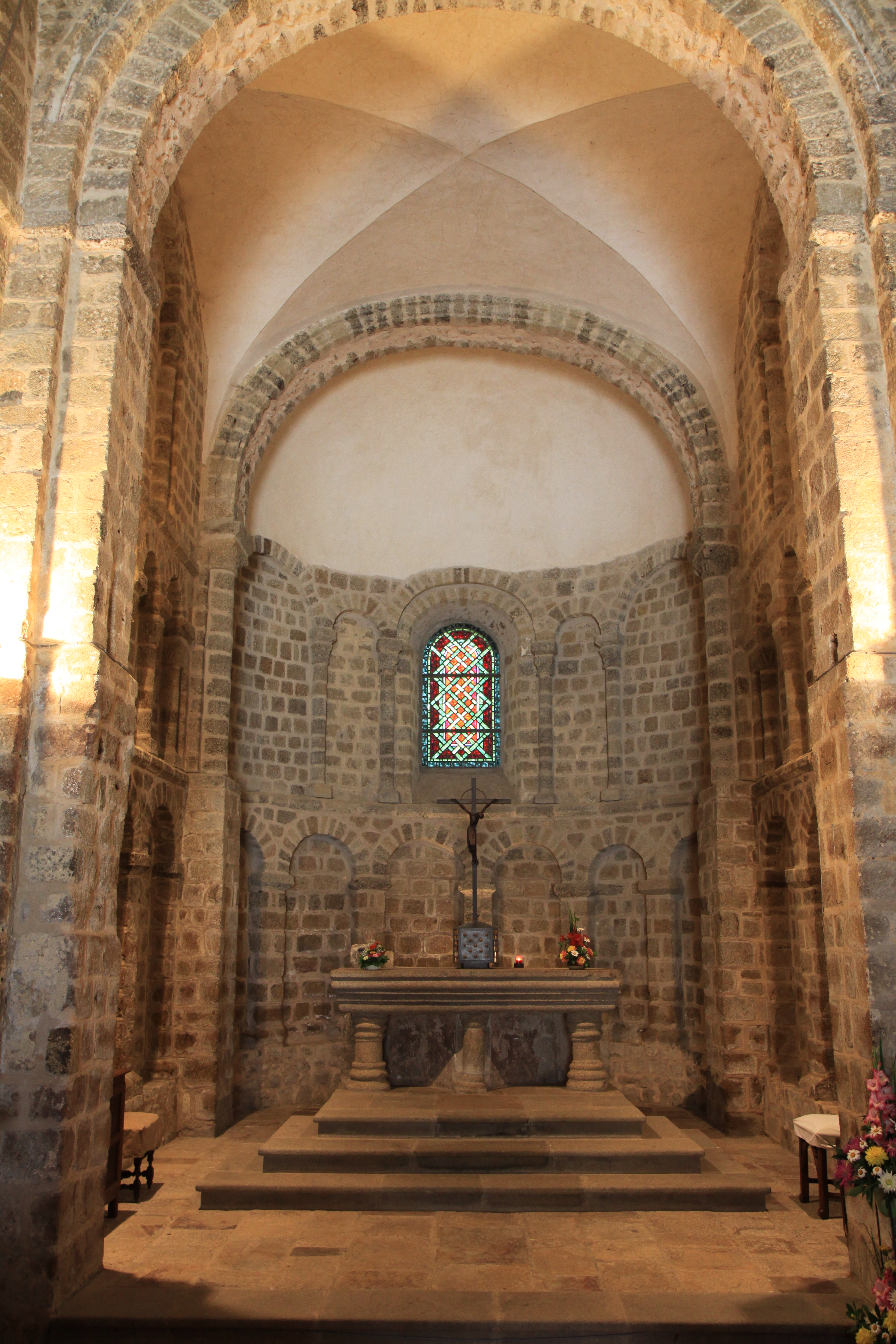 Le choeur de l'église et le maître-autel classé M.H..